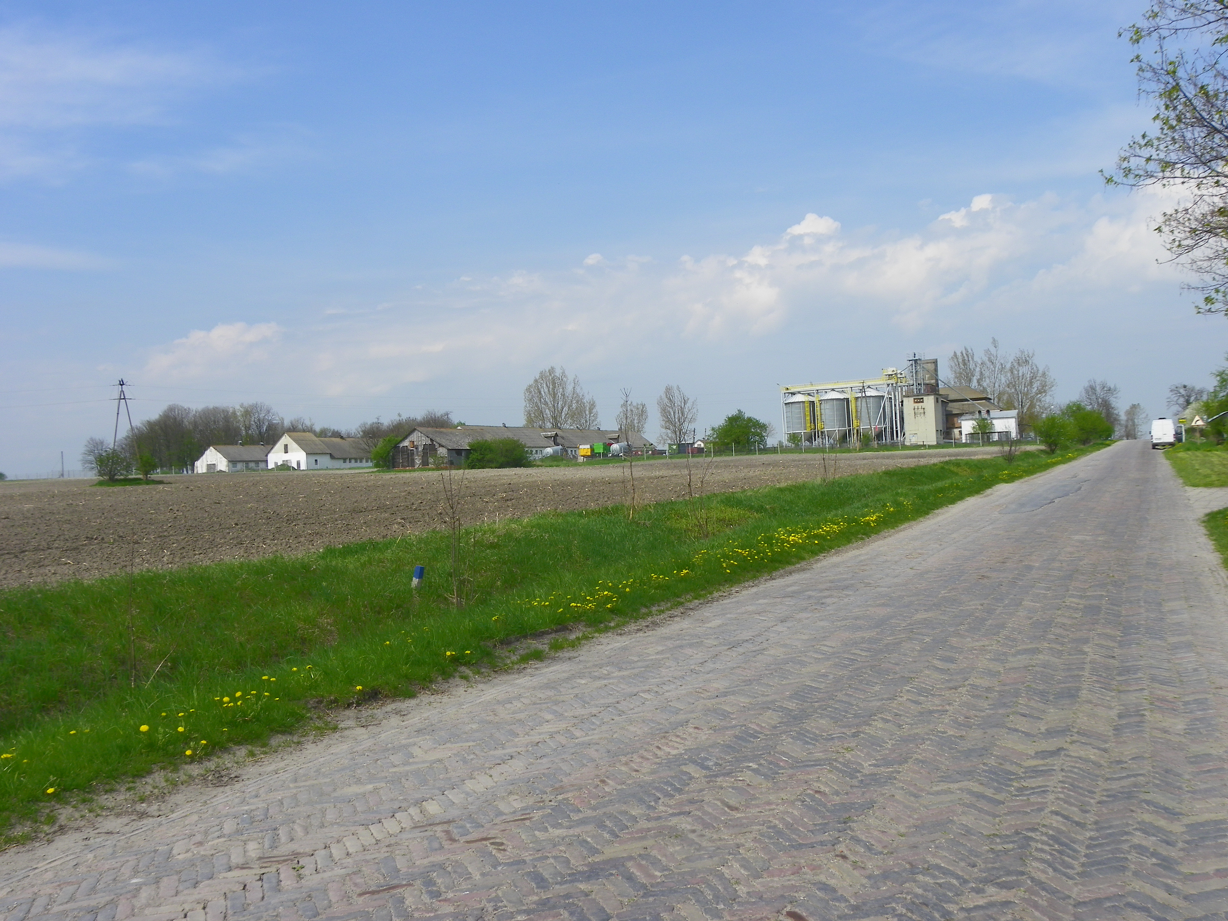 Widok na stary PGR